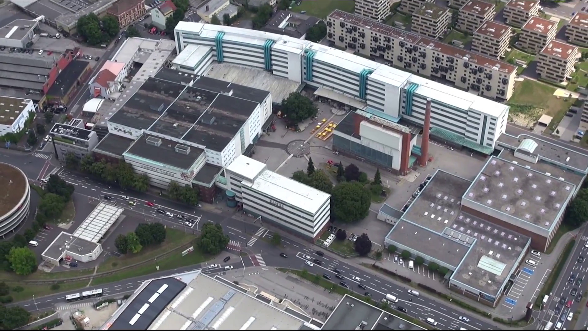 Luftbild der ehemaligen Linzer Tabakfabrik. Screenshot aus einem Video